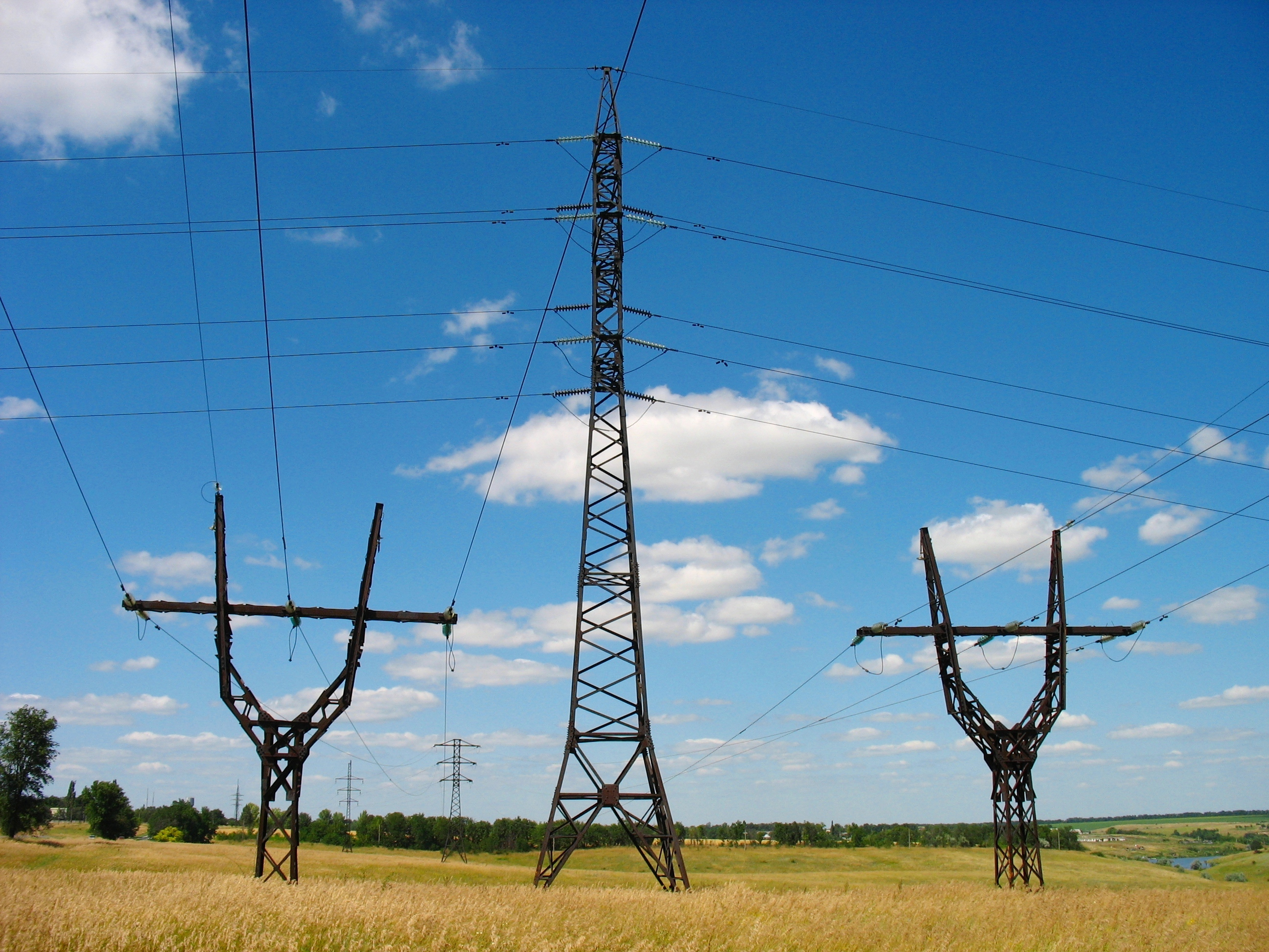 Пересечение ЛЭП (35 и 150 кВ)